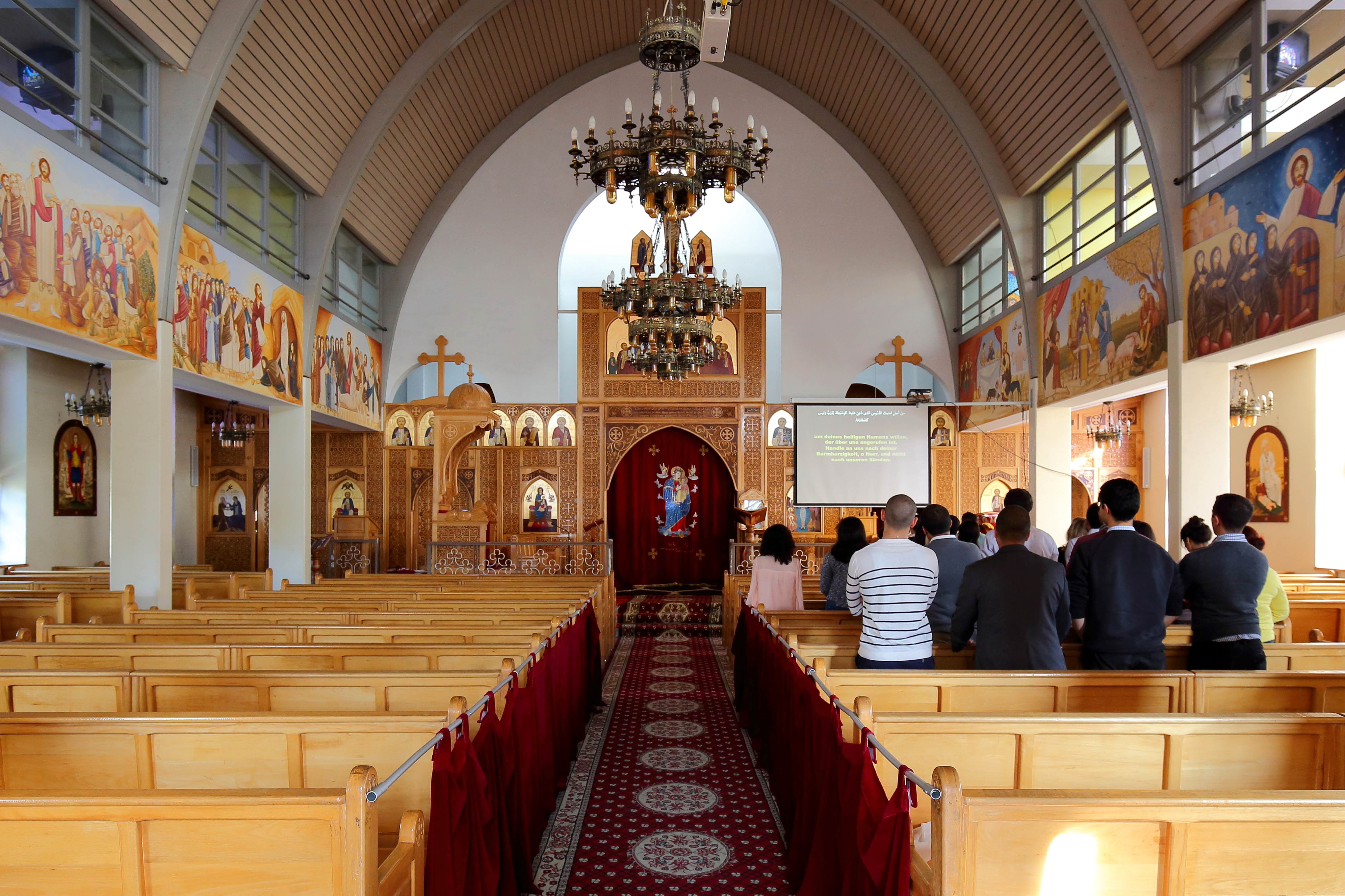 Innenansicht der Koptische Kirche der Heiligen Jungfrau von Zeitoun in der österreichischen Bundeshauptstadt Wien. Sie ist die Bischofskirche des koptischen Bistums für Österreich und die deutschsprachige Schweiz und wurde Ende der 1990er Jahre / Anfang der 2000er Jahre errichtet.